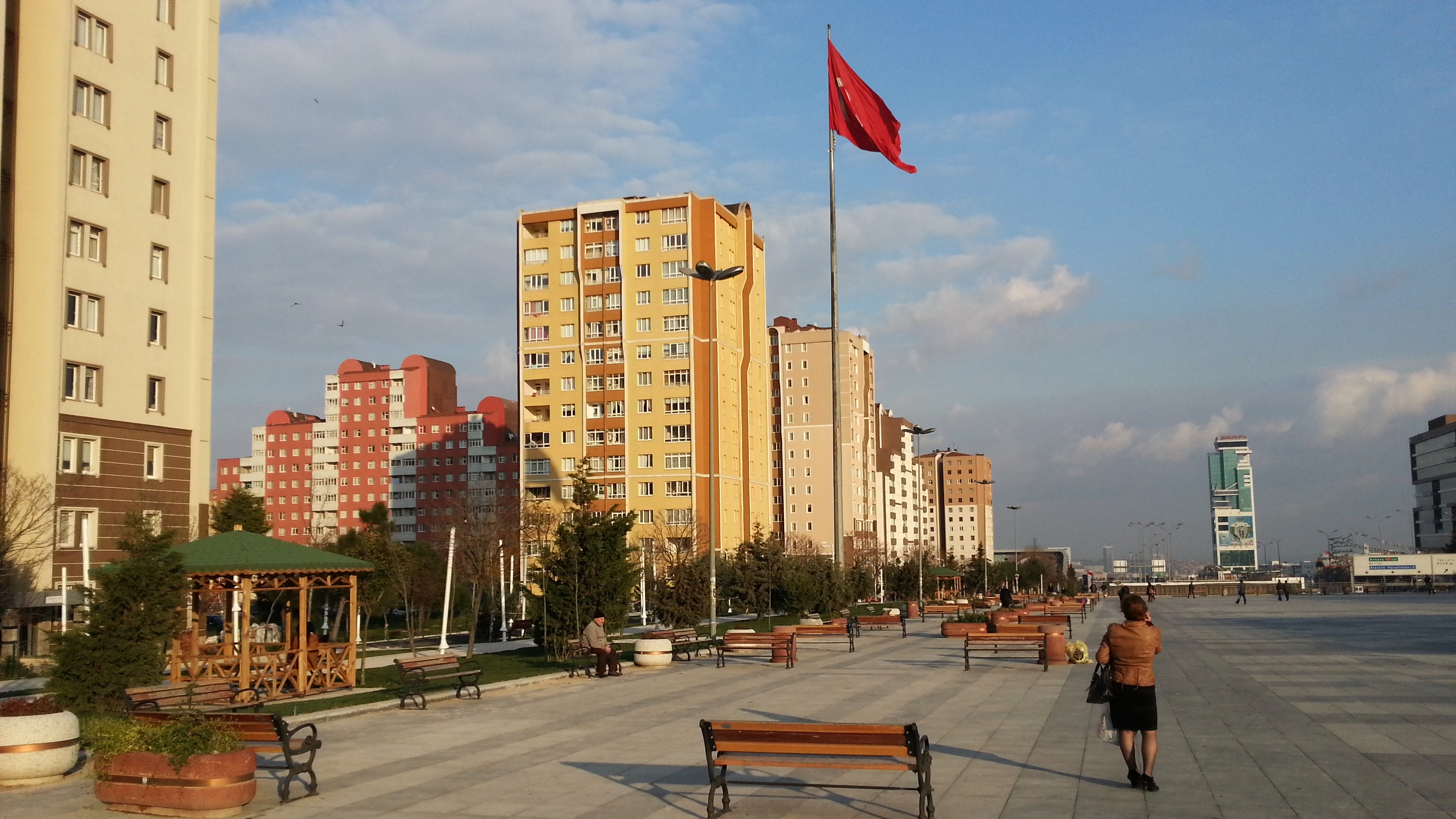 Beylikdüzü Özgürlük Meydanı